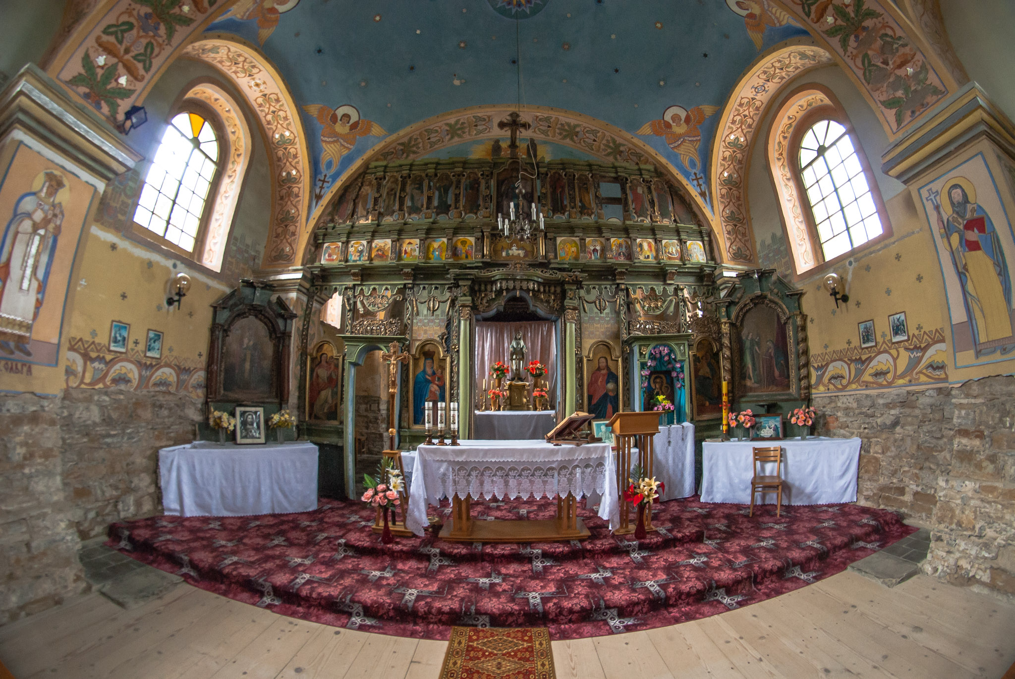 Smolnik, Cerkiew św. Mikołaja w Smolniku